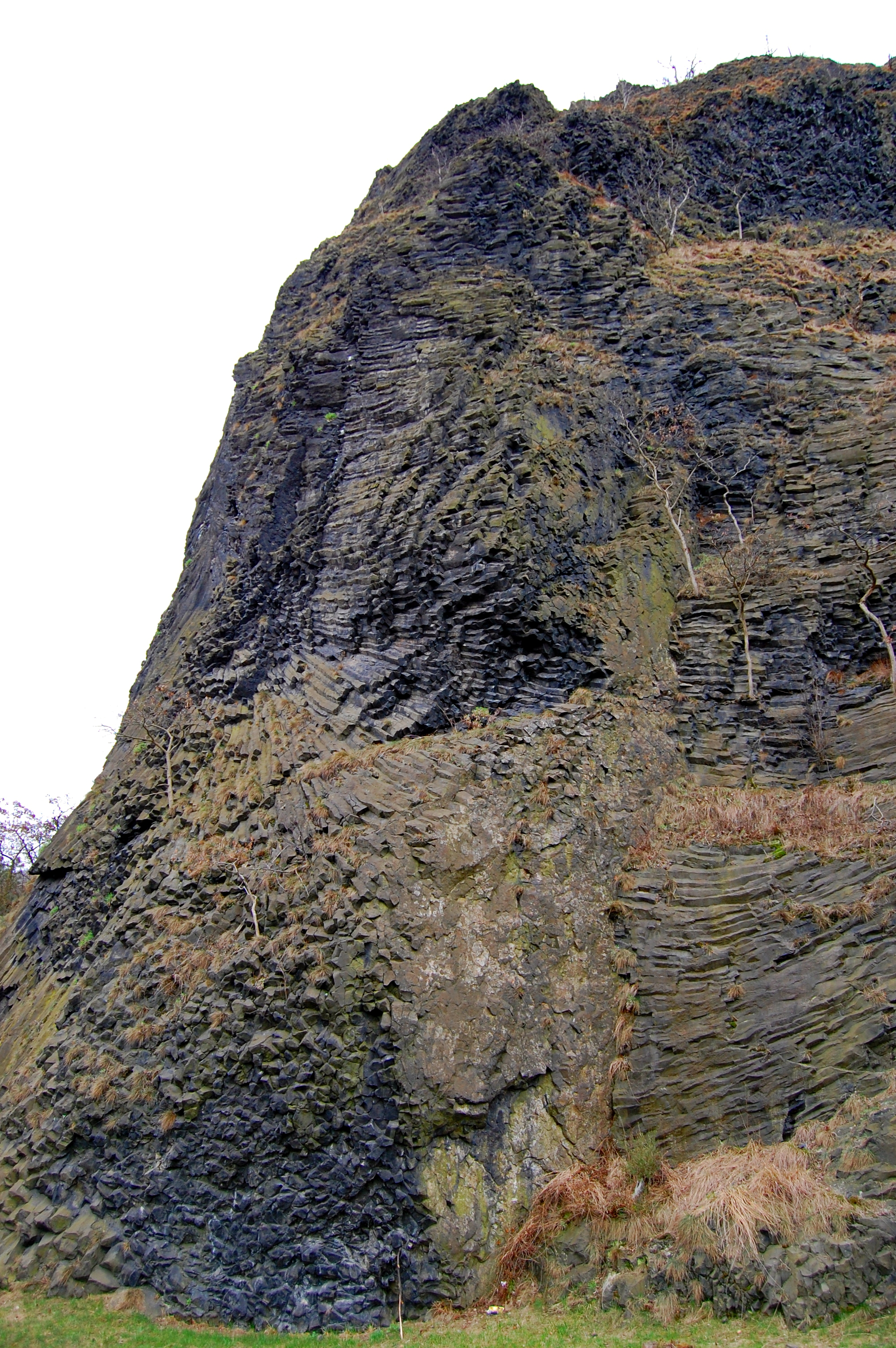 Národní přírodní památka Vrkoč